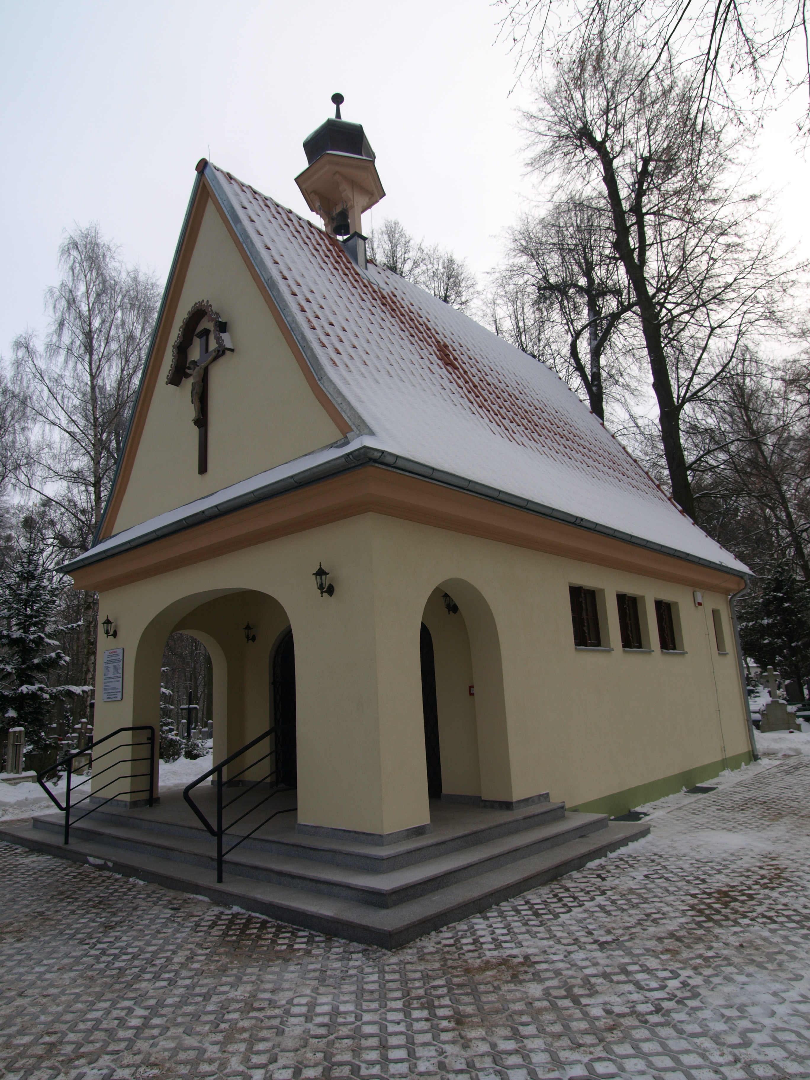 Kaplica cmentarna na Cmentarzu Oliwskim w Gdańsku Oliwie.